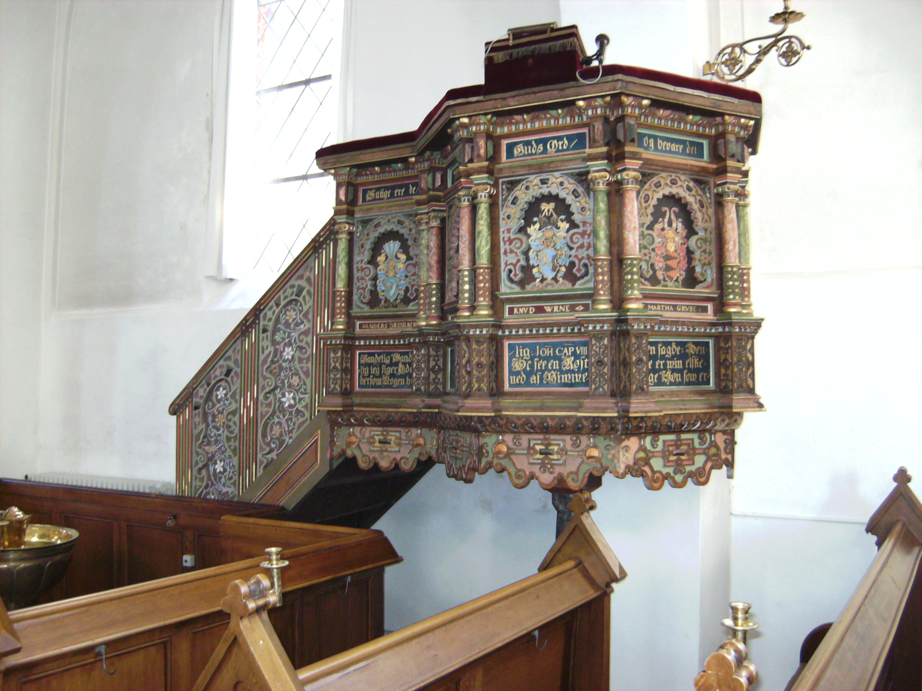 Nysted Kirke, låge, Danmark